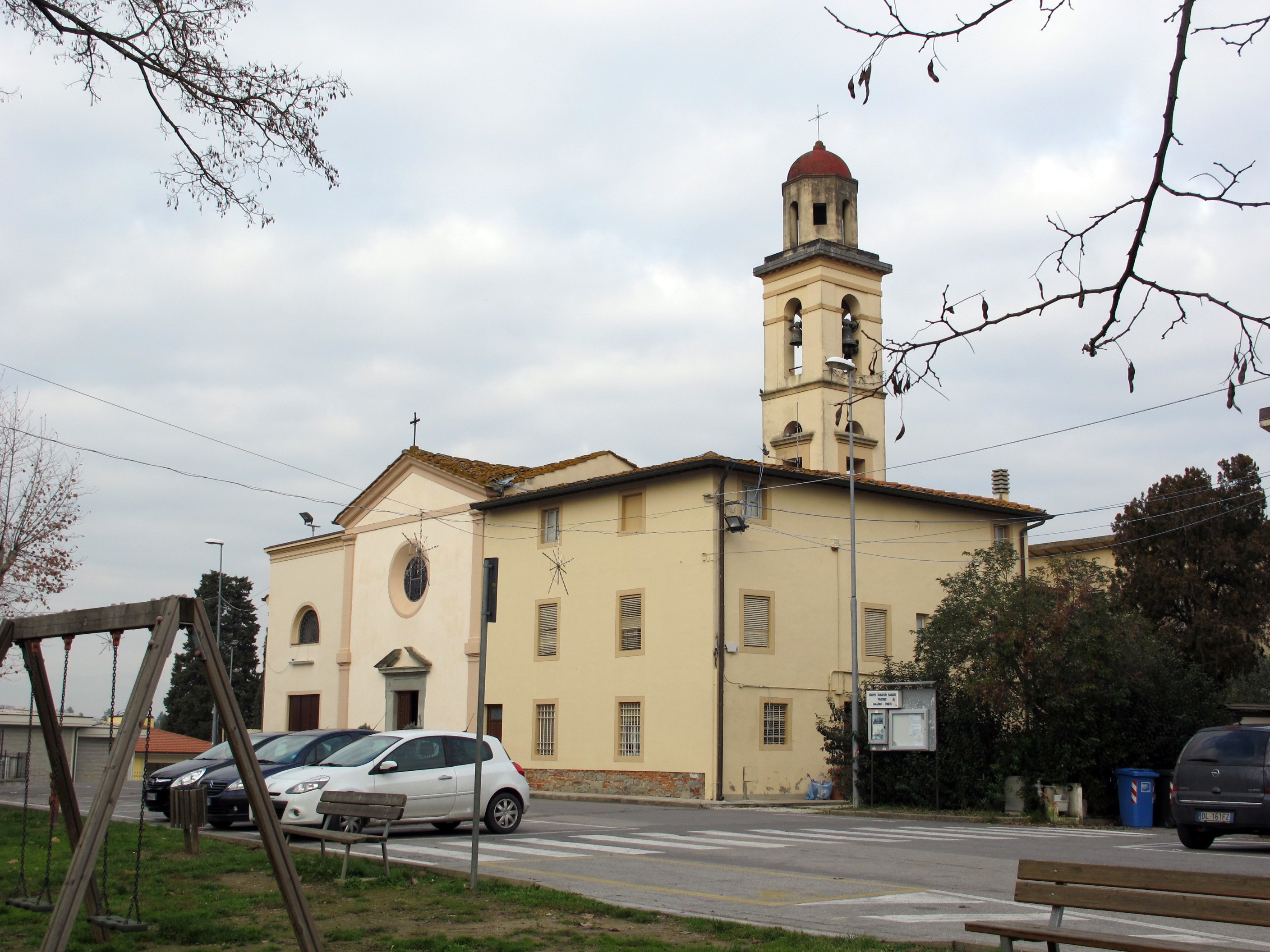 Galleno, ss. pietro e paolo